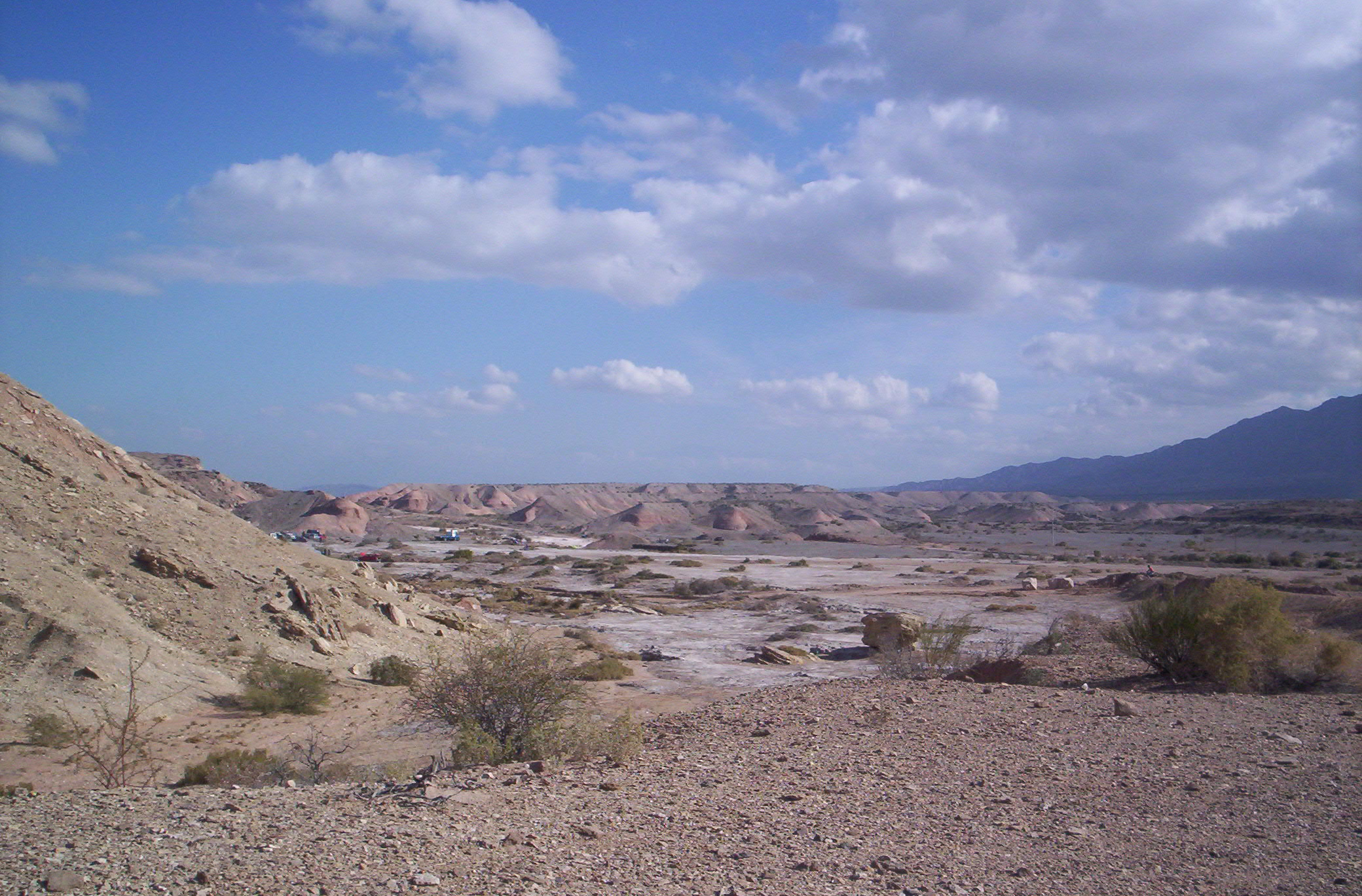 Fotografía del la zona de La Laja, departamento Albardón, Provincia de San Juan, Argentina